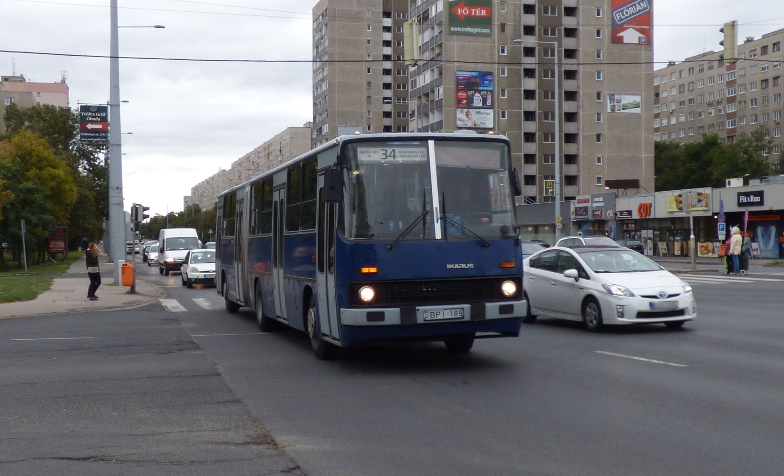 34-es jelzésű Ikarus 280-as busz a Bogdáni útnál (frsz. BPI-189).